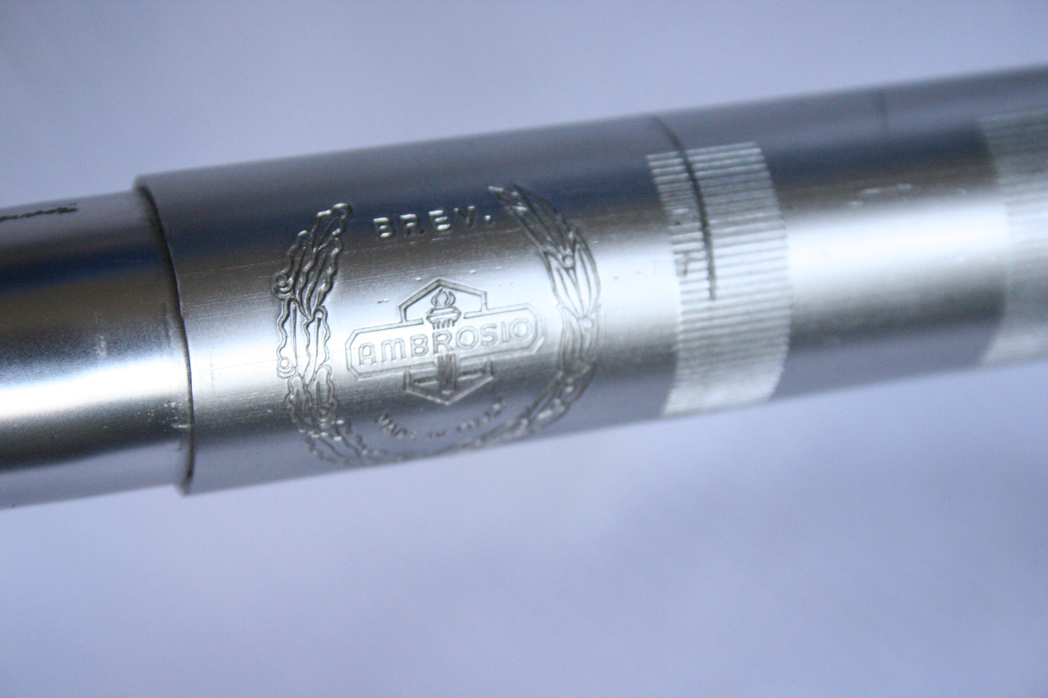 Ambrosio Rennrad Alu-Lenker, Gravur vorne auf übergestülpter Manschette. "Brev.(etto) ... Made in Italy"